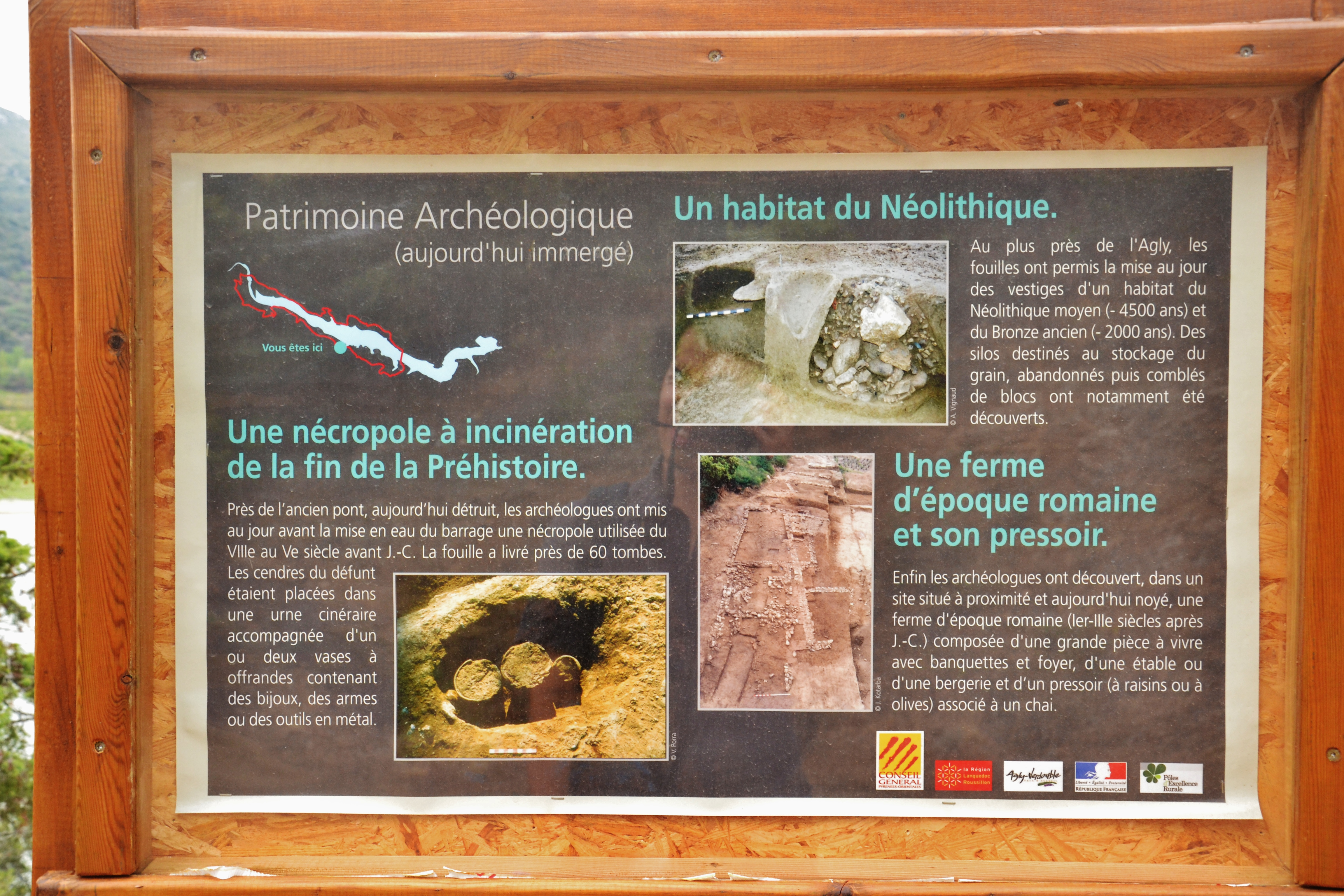 Panneau d'information du chemin d'interprétation faisant le tour du lac de barrage sur l'Agly, à Caramany (Pyrénées-Orientales, France).